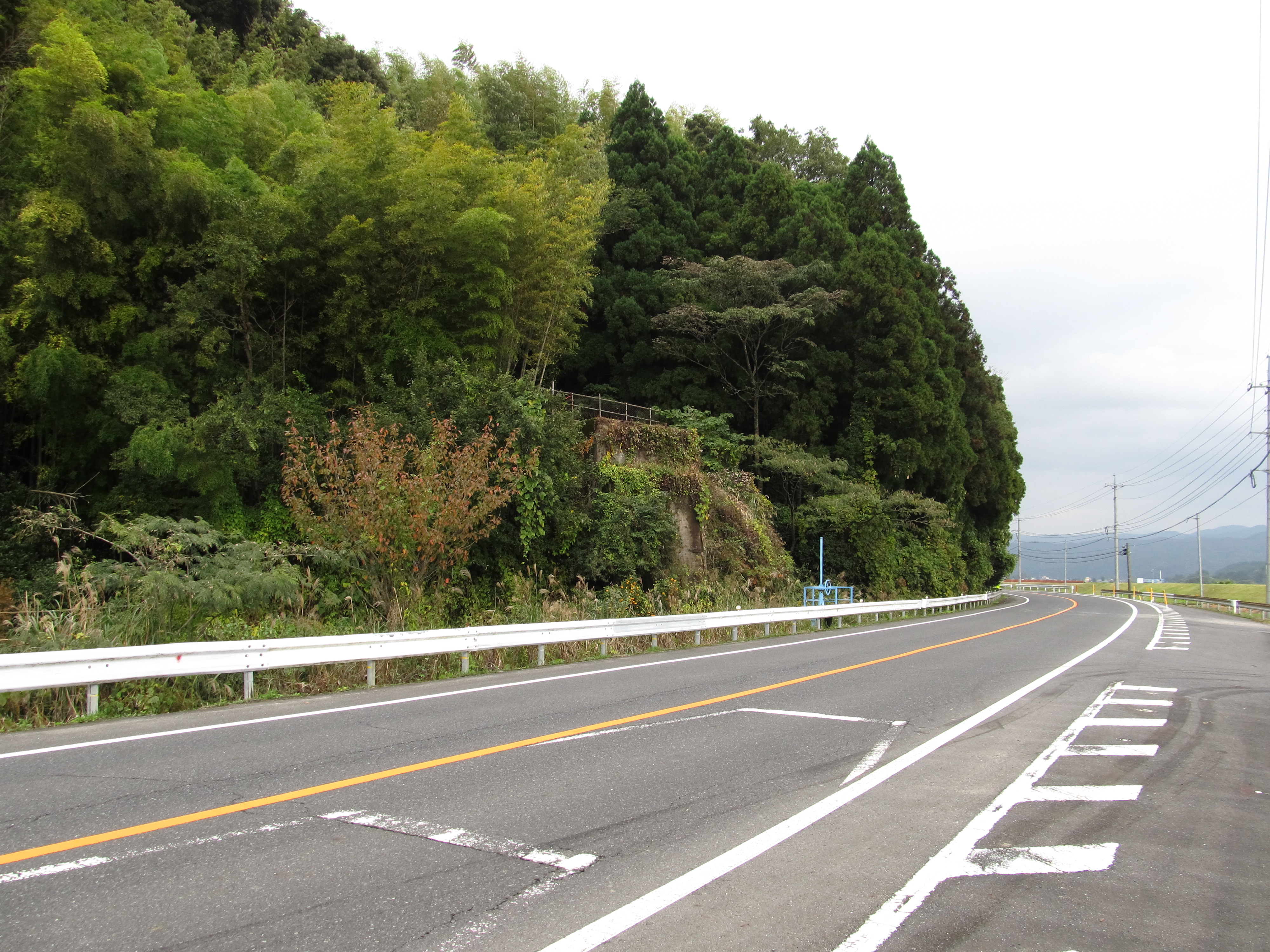 鳥取県道45号倉吉江府溝口線（倉吉市関金町今西）。 画像左奥に写っている橋台はこの道を跨いでいた旧国鉄倉吉線泰久寺－山守間の陸橋跡。